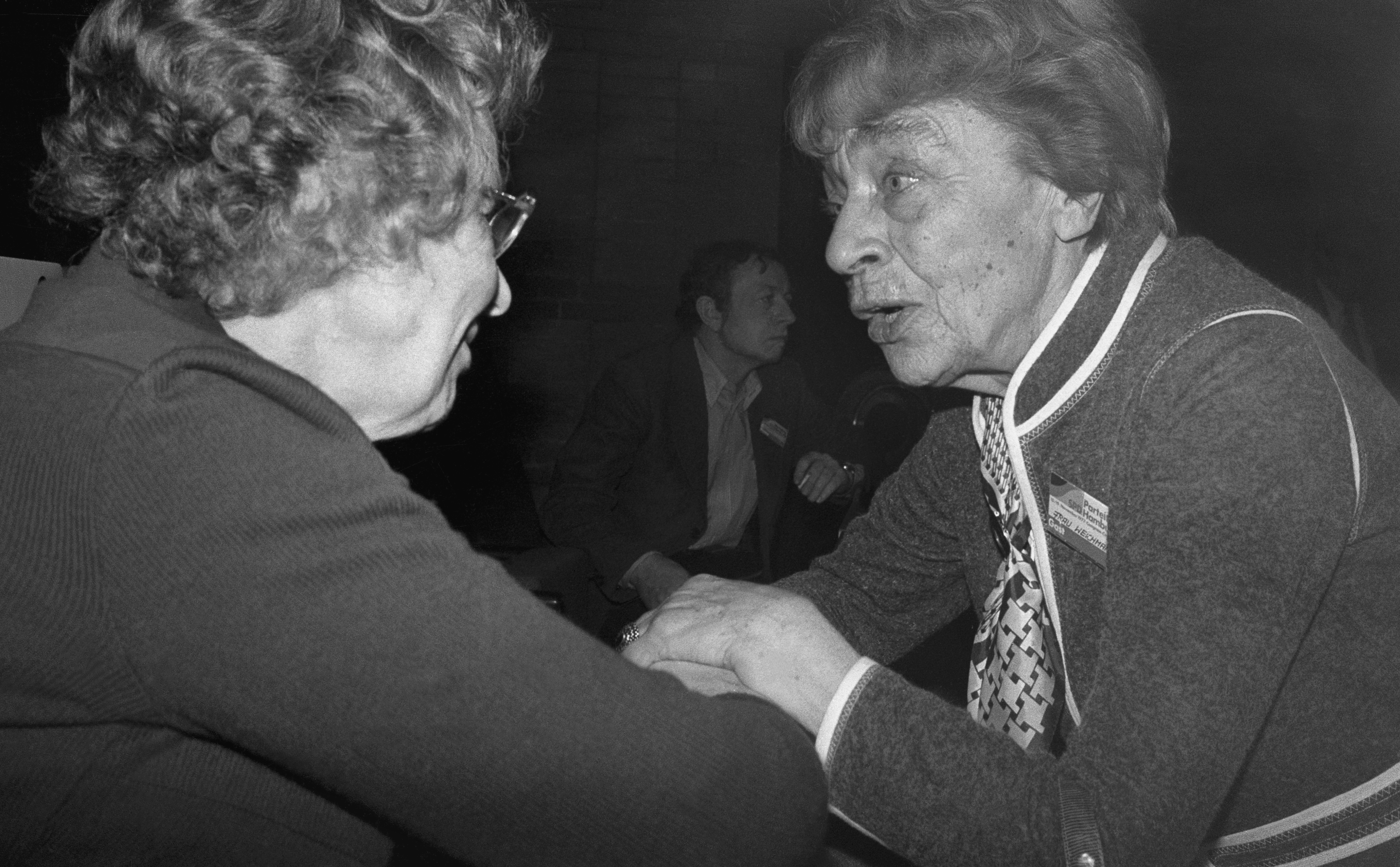 Elsbeth Weichmann (rechts) begrüßt Paula Karpinski auf dem SPD-Landesparteitag 1982 in Hamburg